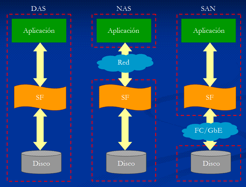 DAS vs. NAS vs. SAN.Referencias:DAS: Direct Attached Storage o almacenamiento de conexión directaNAS: Network Attached Storage o almacenamiento conectado en redSAN: Storage Area Network o red de área de almacenamientoSF: system files o sistema de archivos.FC: fibre channel o canal de fibra.